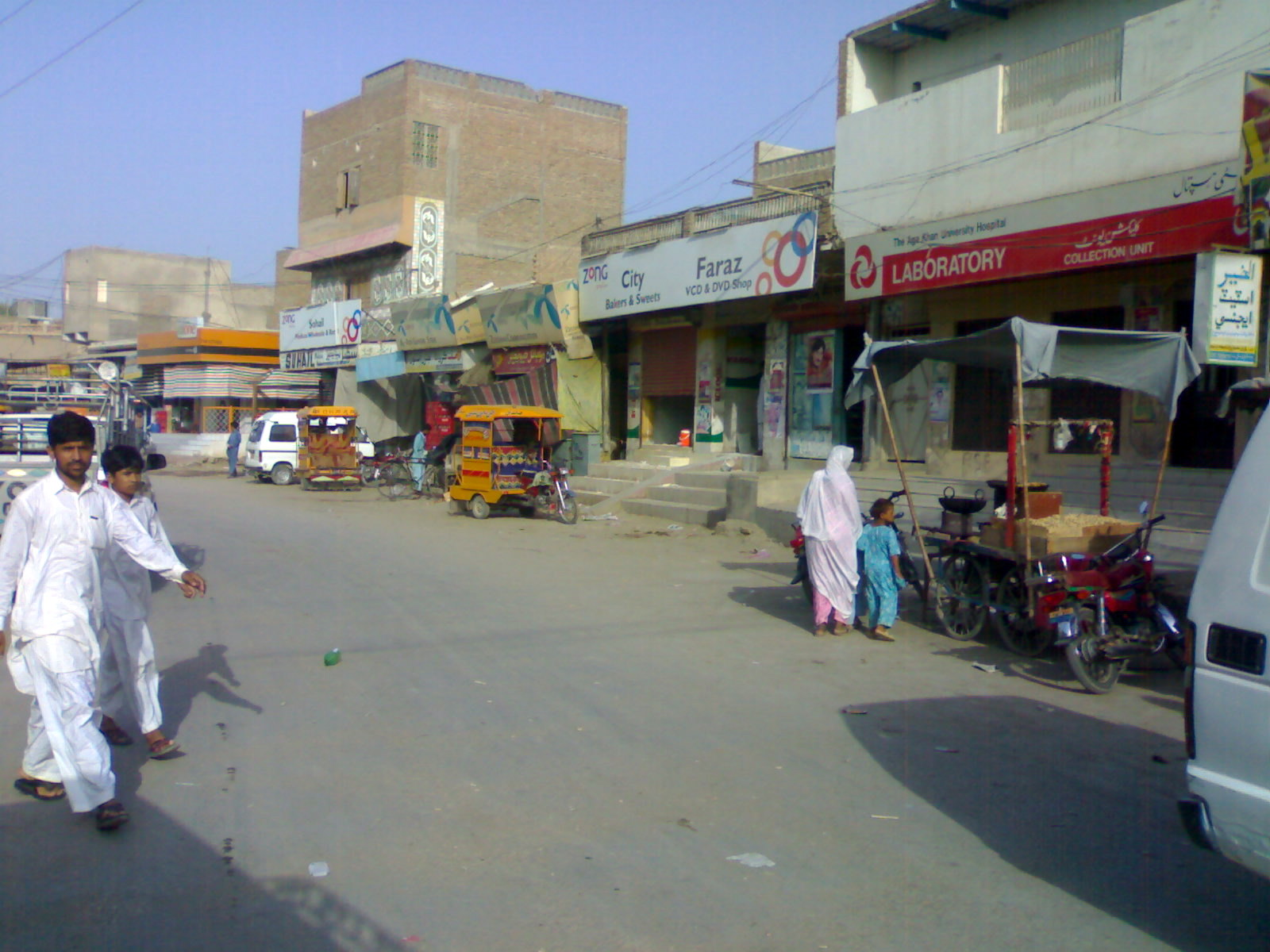 Naushahro Feroze, Pakistan